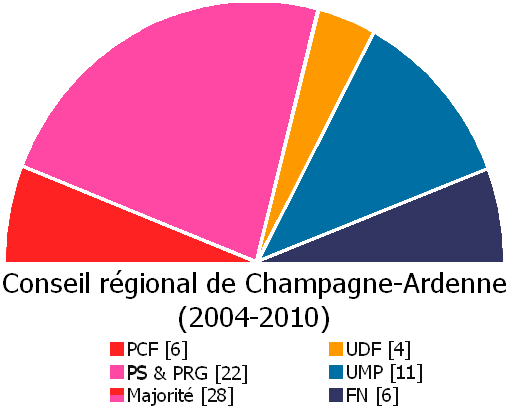 Composition du conseil régional de Champagne-Ardenne de 2004 à 2010